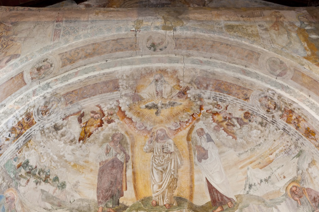 Trasfigurazione - affresco absidale chiesa romanica di San Salvaro